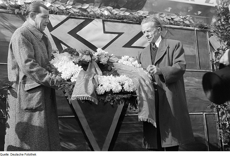 Original image description from the Deutsche Fotothek Ottomar Geschke spricht